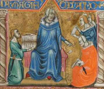 King Robert of Anjou surrounded by his scribes